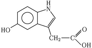 5-hidroxiindolecetsav szerkezeti képlete